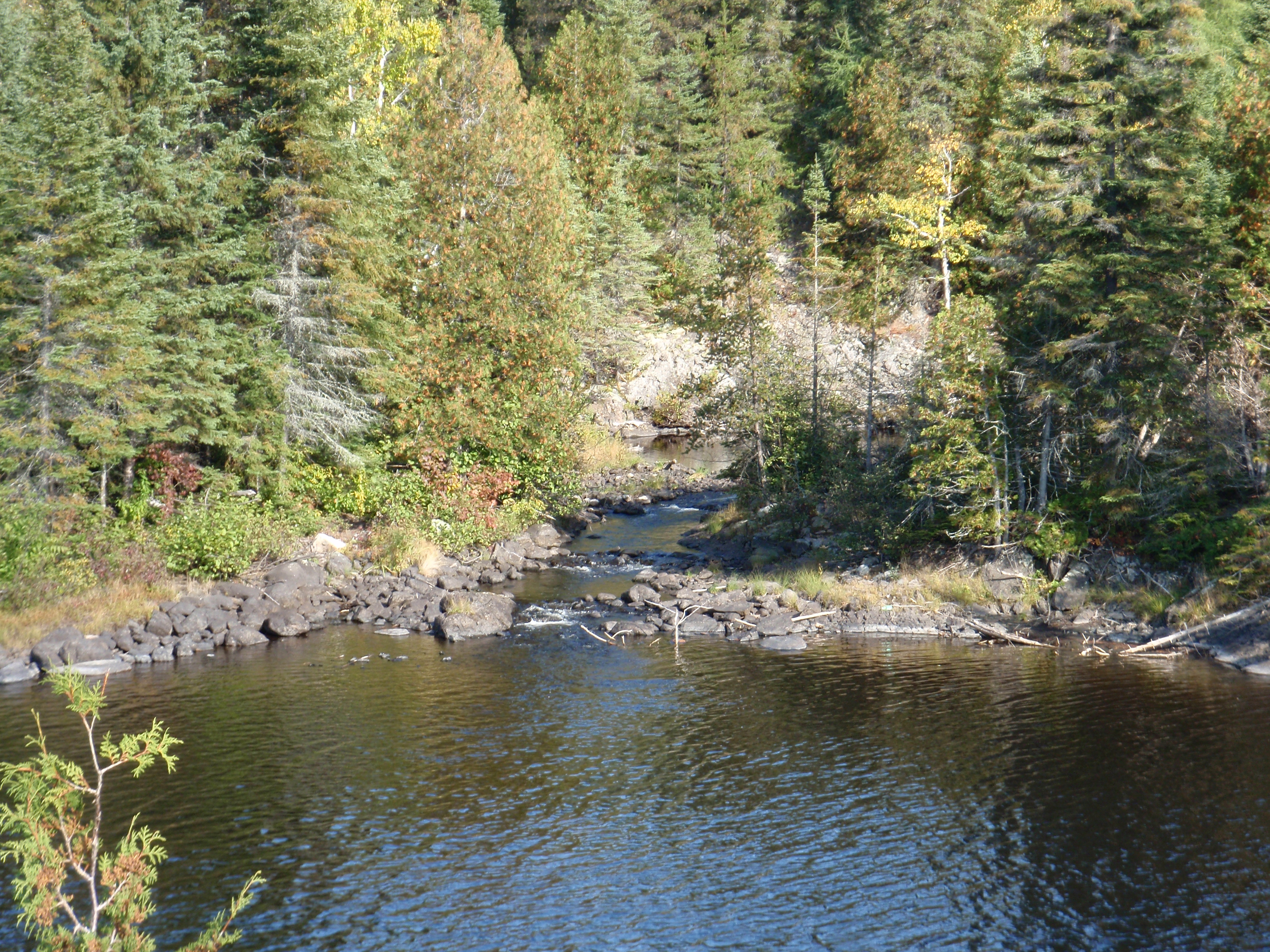 Misema River Fork